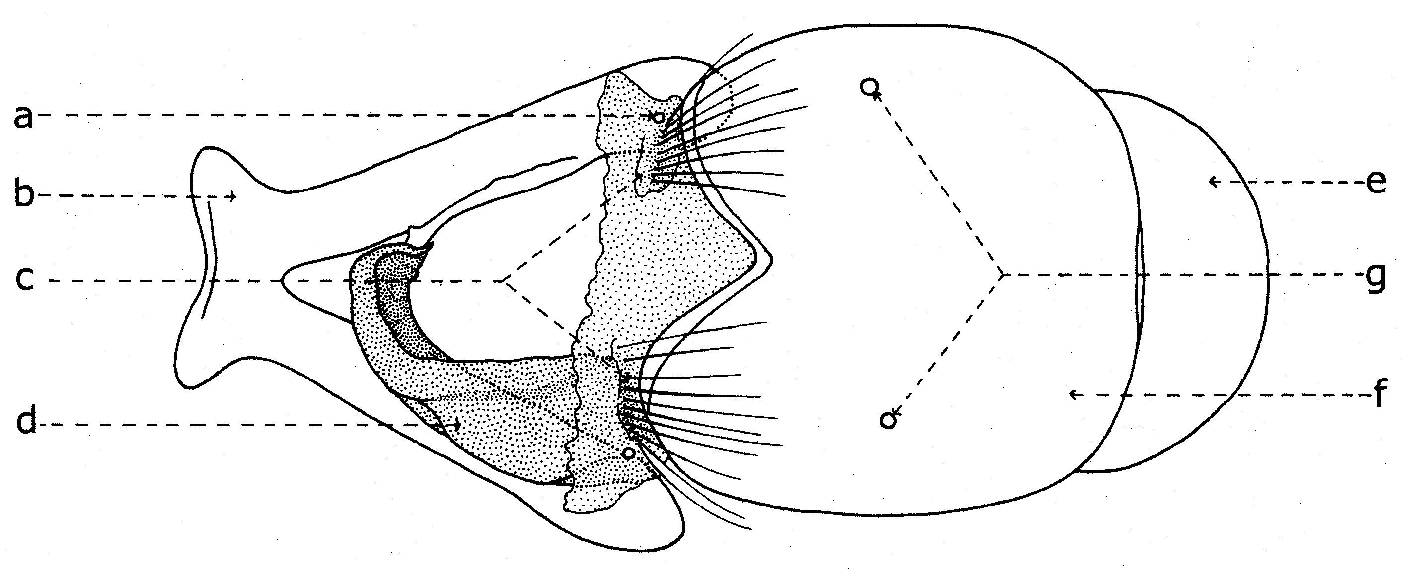 Fig. 11. Postabdomen de Sarcophaga carnaria Bottcher, 1912.